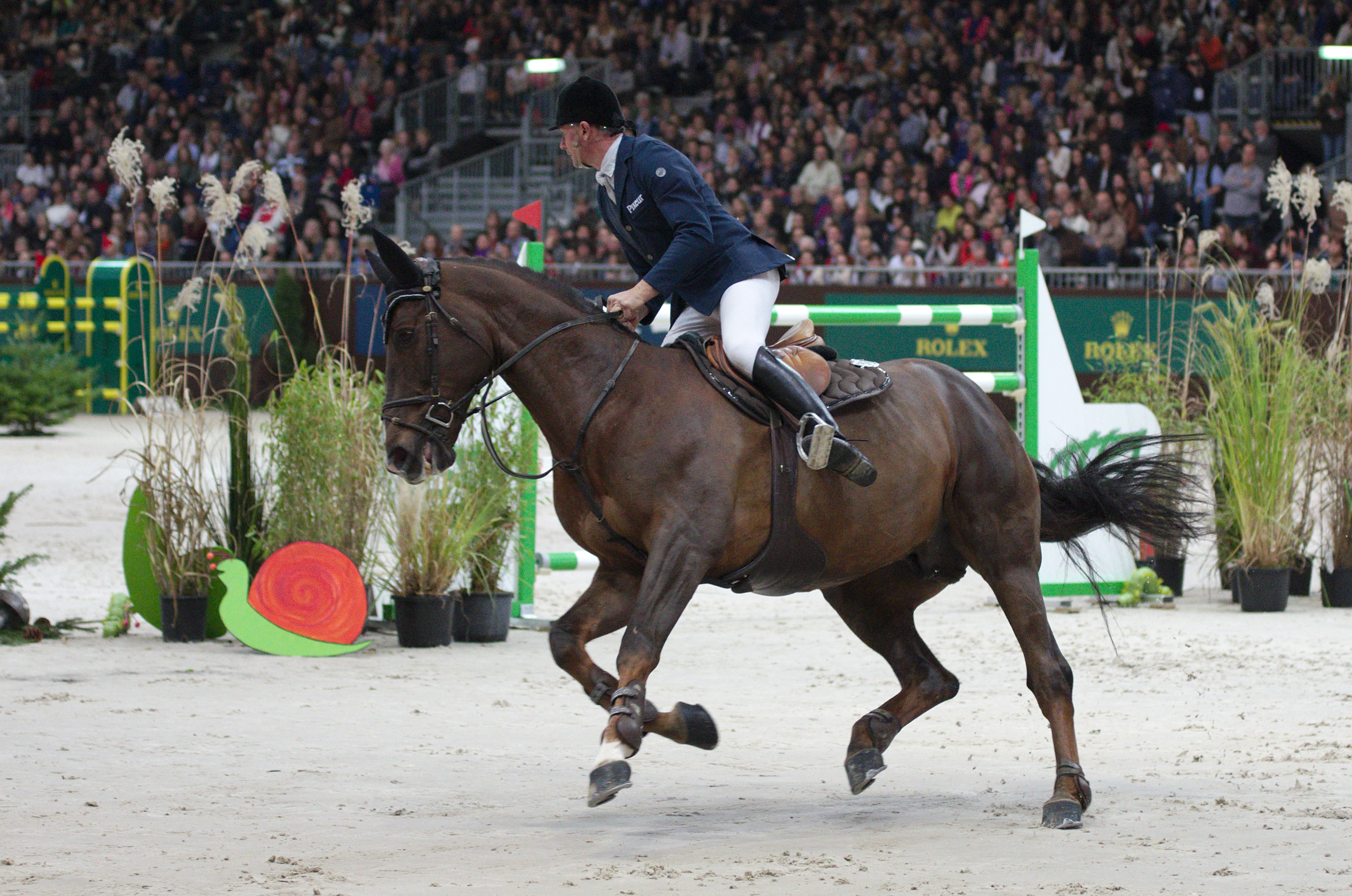 54eme CHI de Genève - 20141213 - Coupe de Genève - Jerome Hurel et Quartz Rouge